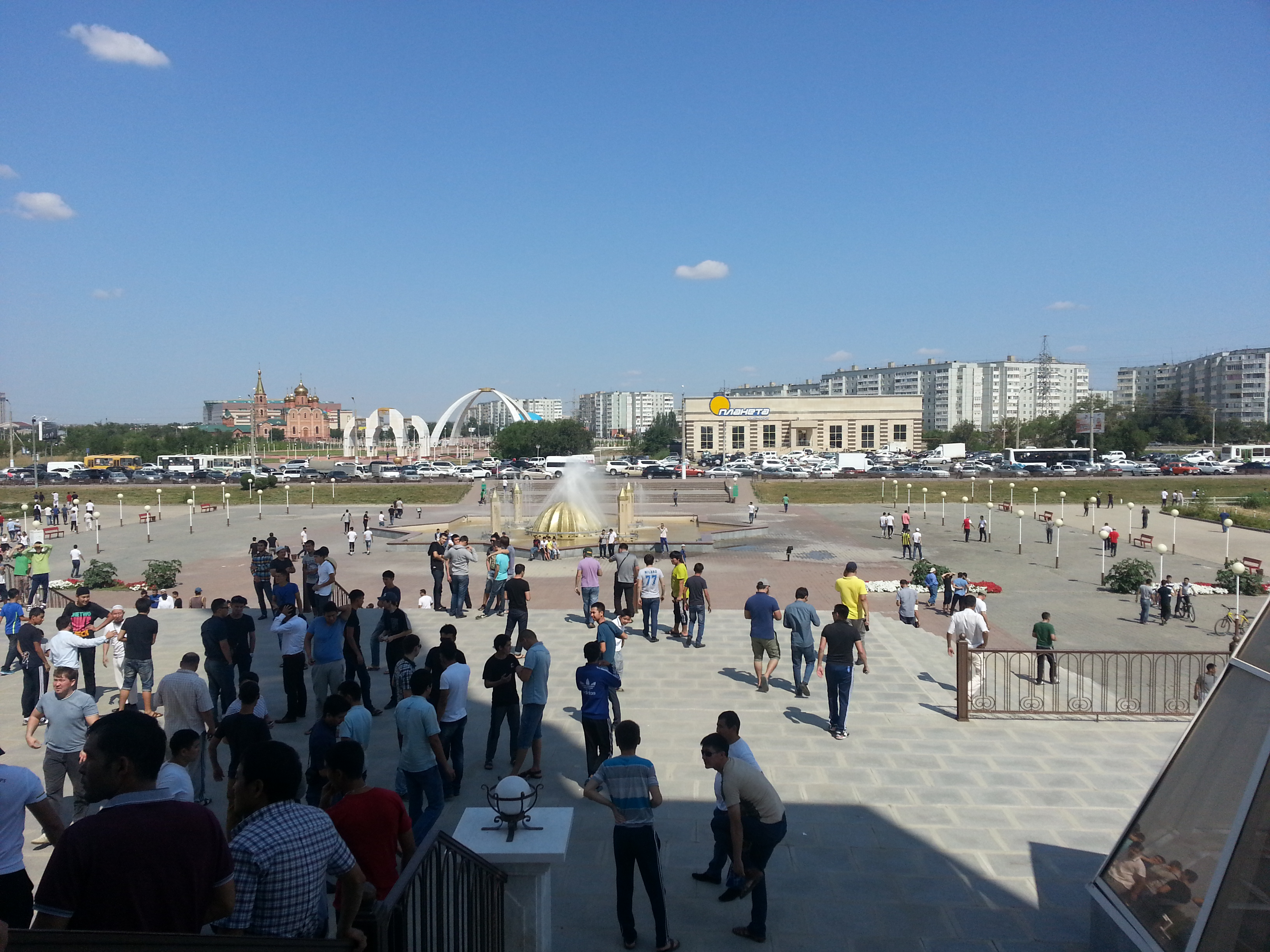 После Пятничного намаза в мечети Нур Гасыр (Актобе, Казахстан)